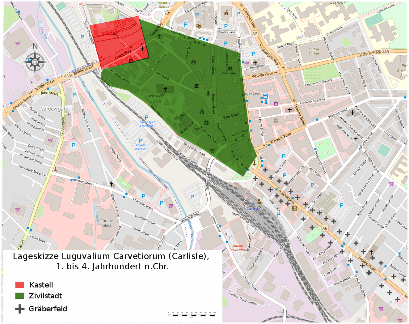 Lageskizze des römischen Kastells Luguvalium und der Zivilstadt Luguvalium Carvetiorum vom 1. bis 4. Jahrhundert n.Chr. (Carlisle, England).